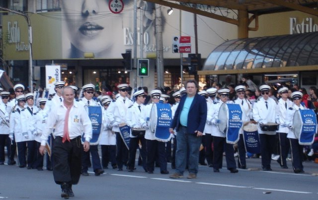 Banda do Santa representando a marinha rio grandense no desfile farroupilha de 2009